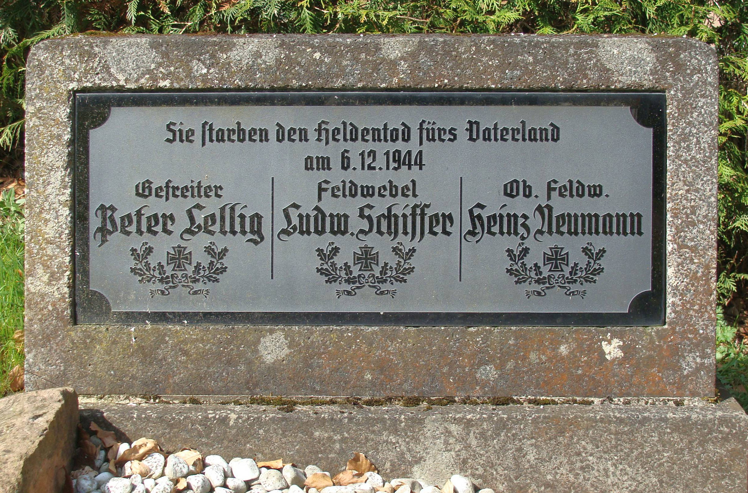 Grabstein der im Franzosenhau (Büdinger Wald, Gemarkung Gettenbach) abgestürzten Flugzeugbesatzung (Nachtjäger ME 110 G-4) auf dem Friedhof in Gettenbach